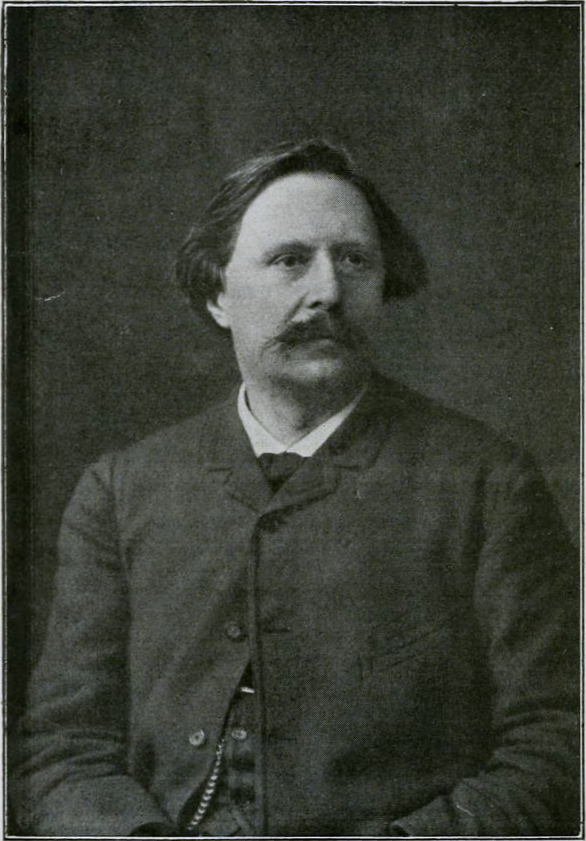 Photo d'Édouard Schuré